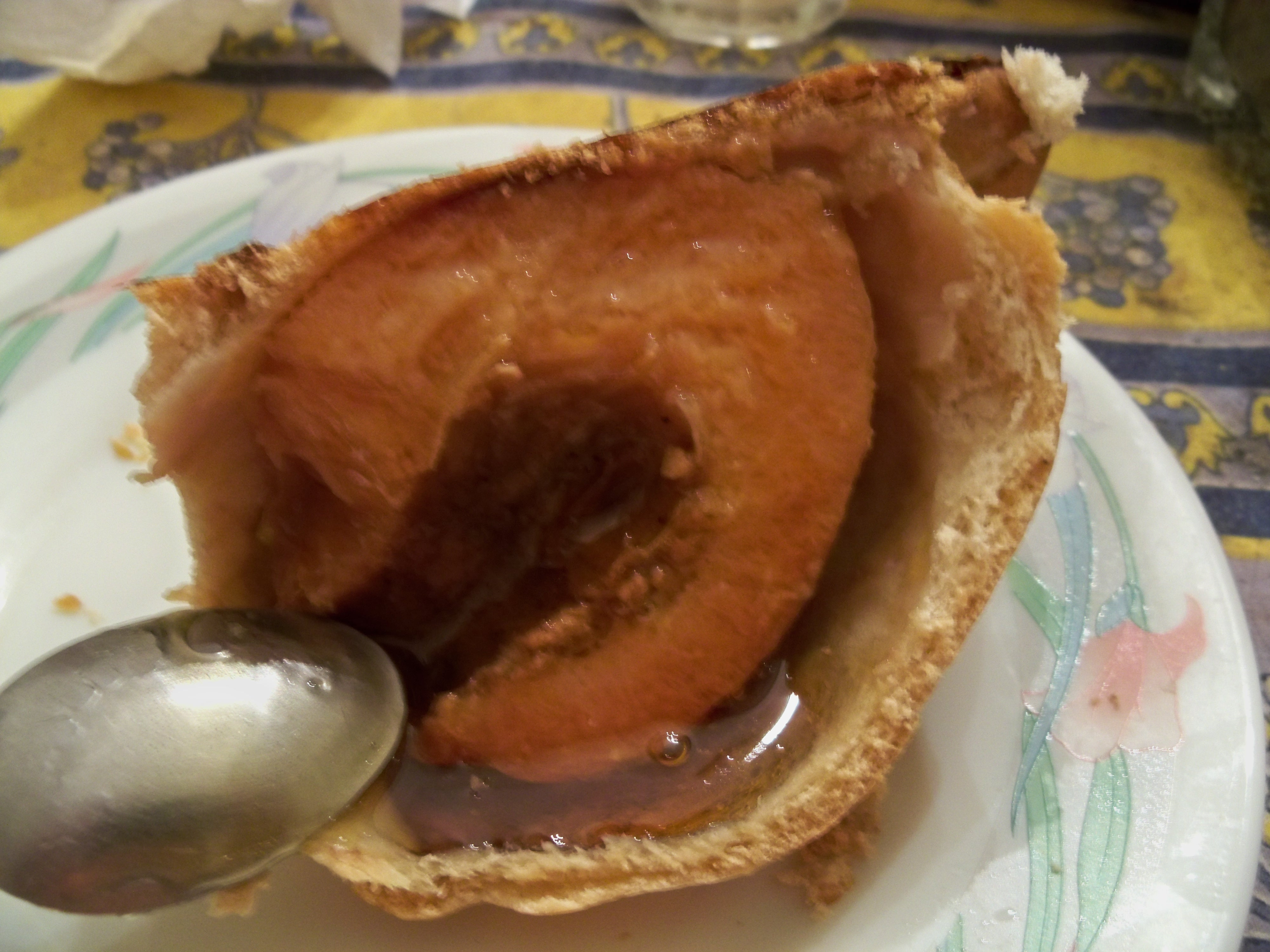 Pain coing, spécialité provençale à base de coing entier